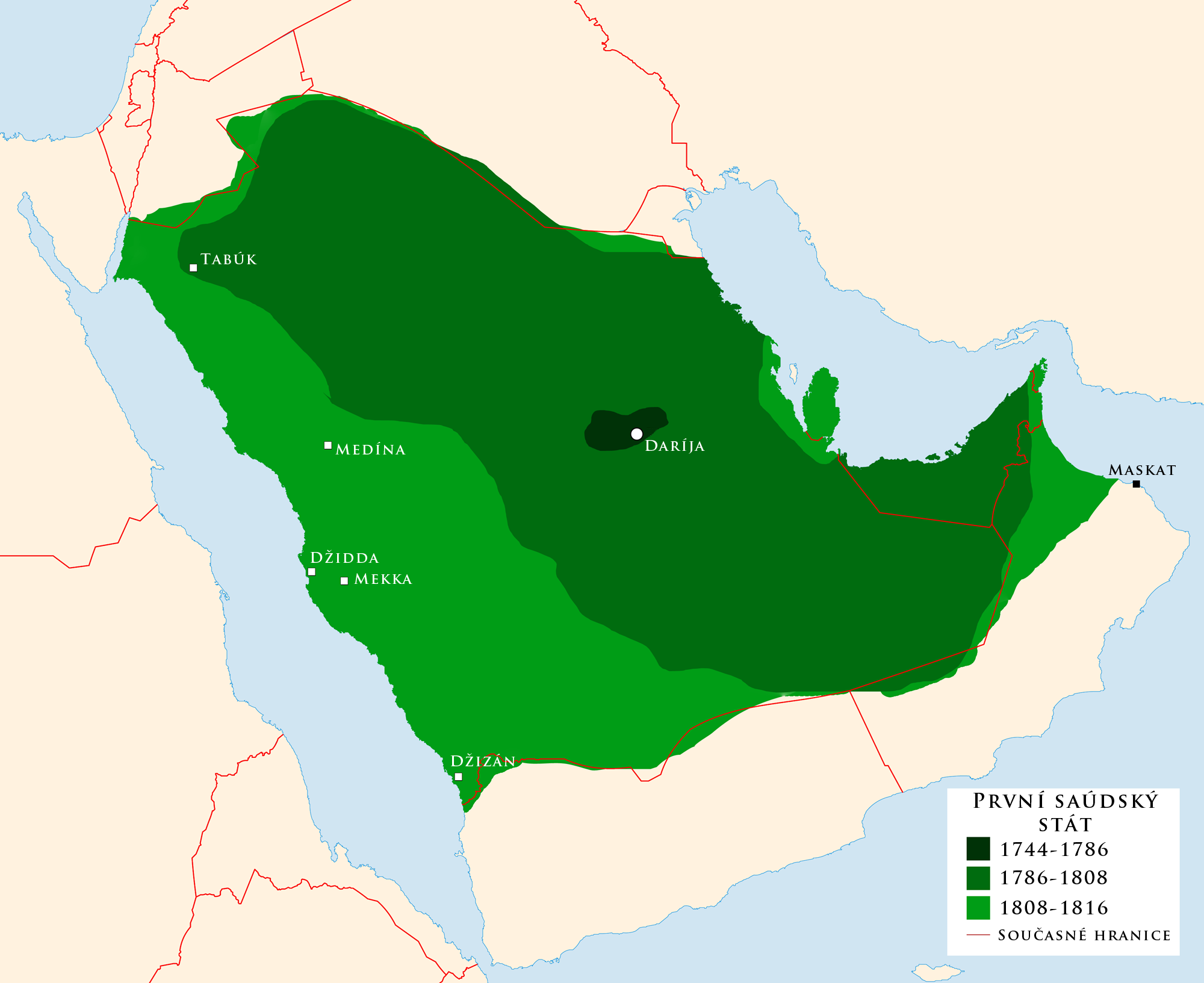 Mapa První Saúdský stát, emirát Diriyah. 1744 – 1766 1786 – 1808 1808 – 1816